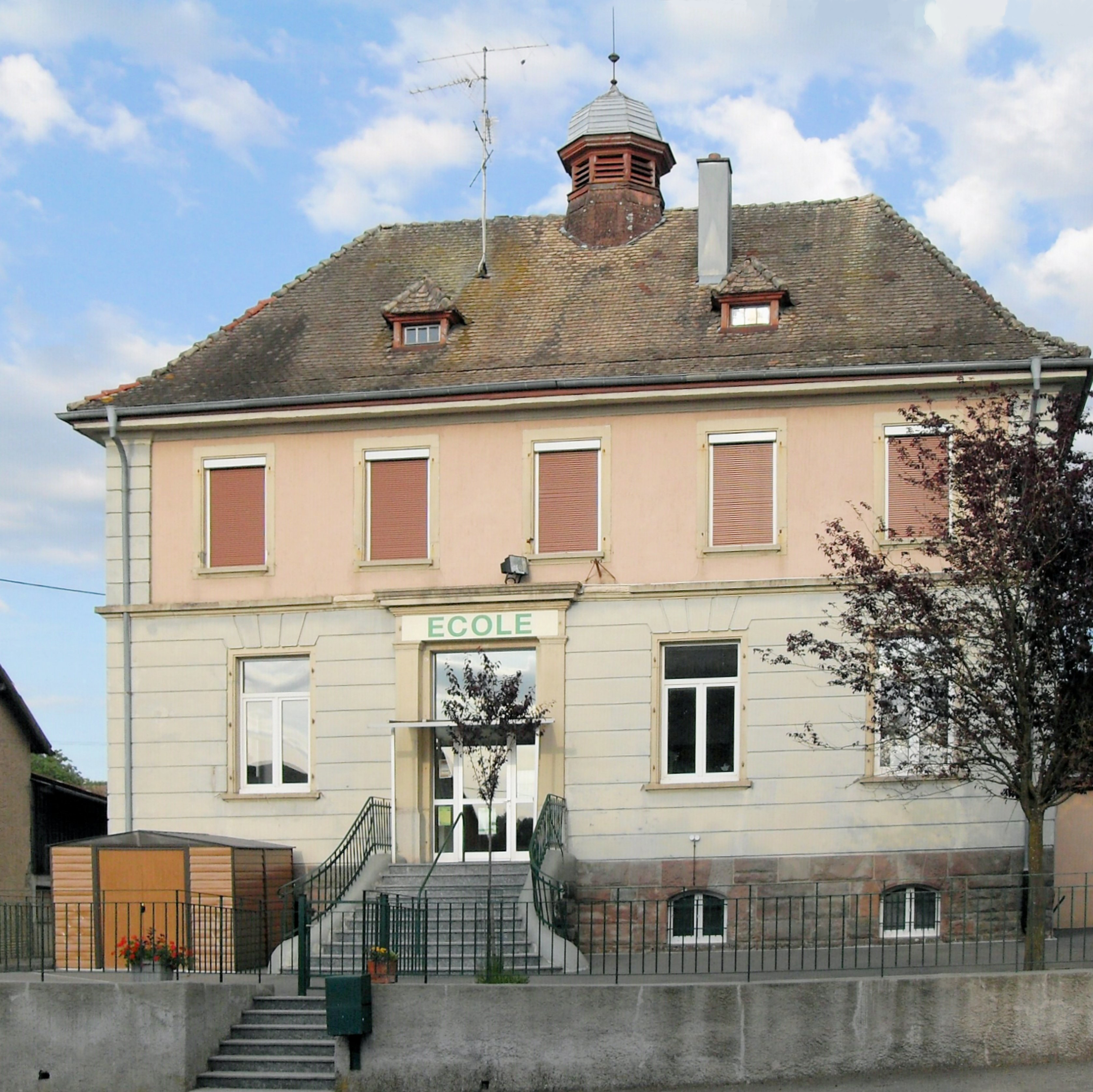 L'école de Largitzen